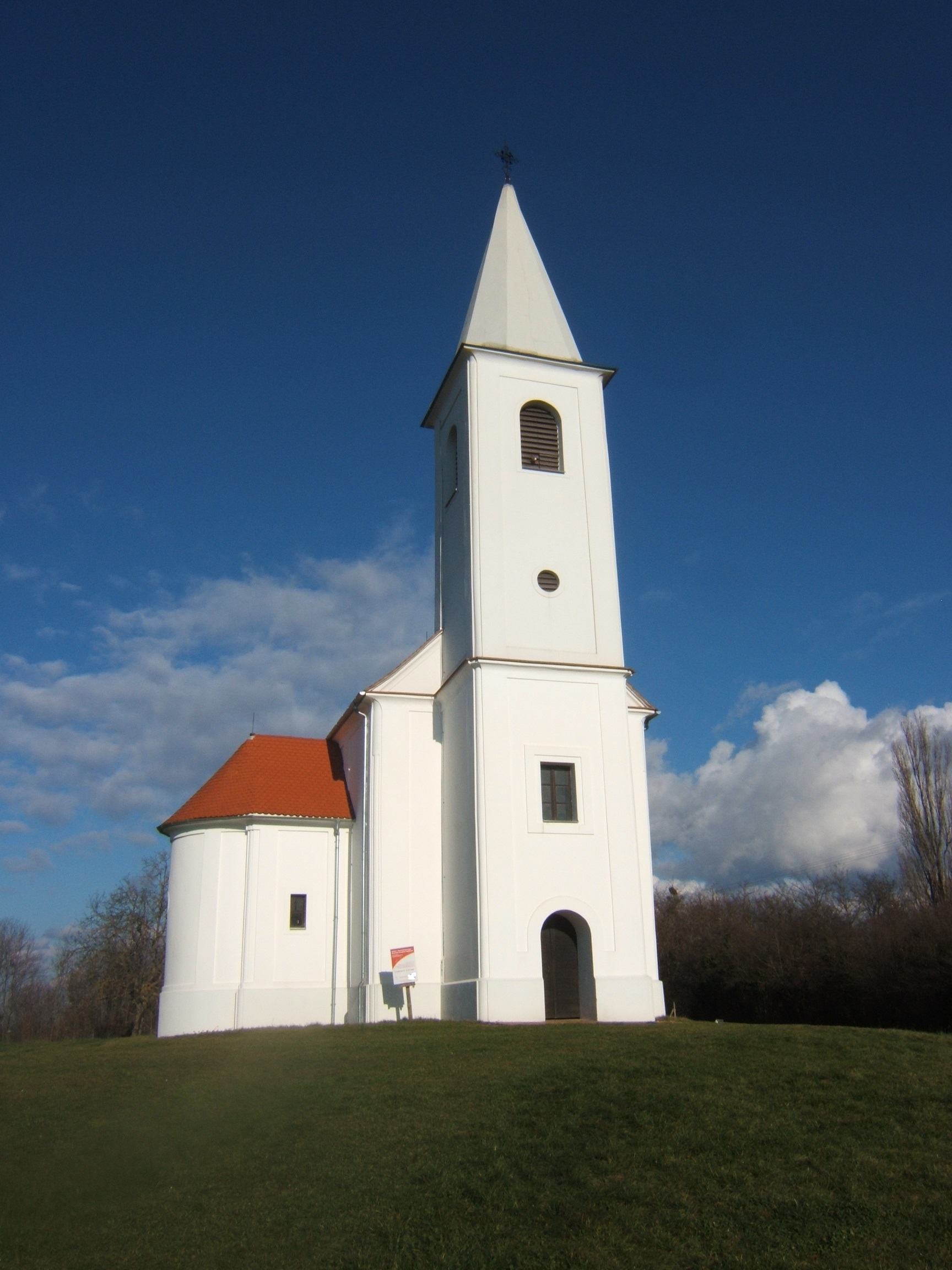 Őrtilos, szentmihályhegyi templom